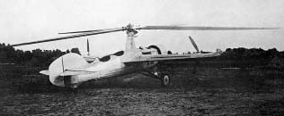 Вертолёт ЦАГИ-11ЭА, 1940